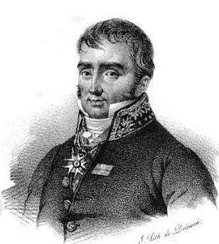 Portrait of Cécile Stanislas Xavier Louis, comte de Girardin (1762-1827), French politician